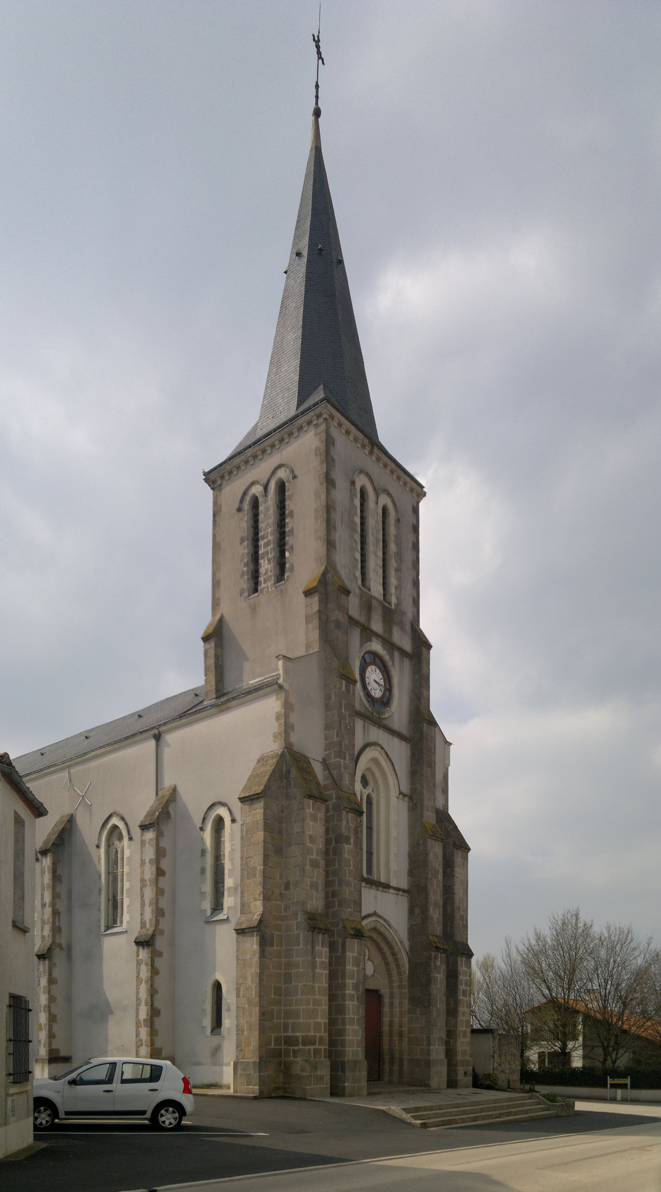 Église Saint-Léger, Fr-49-Saint-Léger-sous-Cholet.